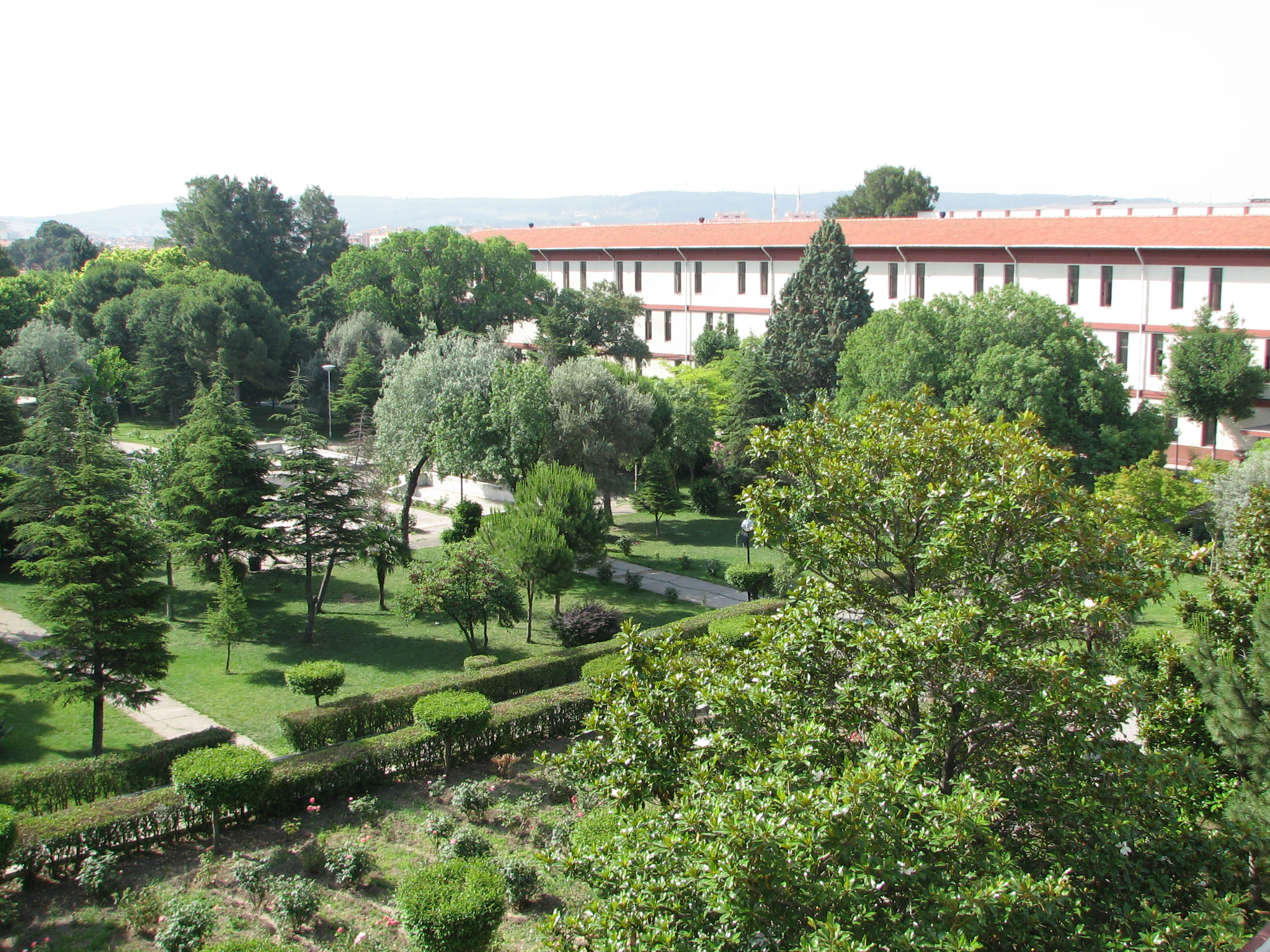 Buca Eğitim Fakültesi